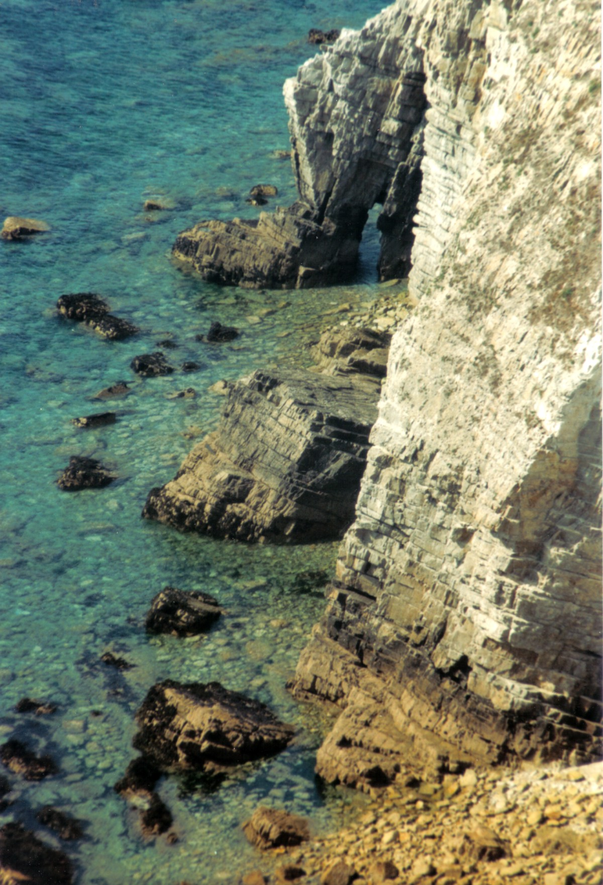 Pointe de Dinan - Felsentor (Halbinsel Crozon) in der Bretagne